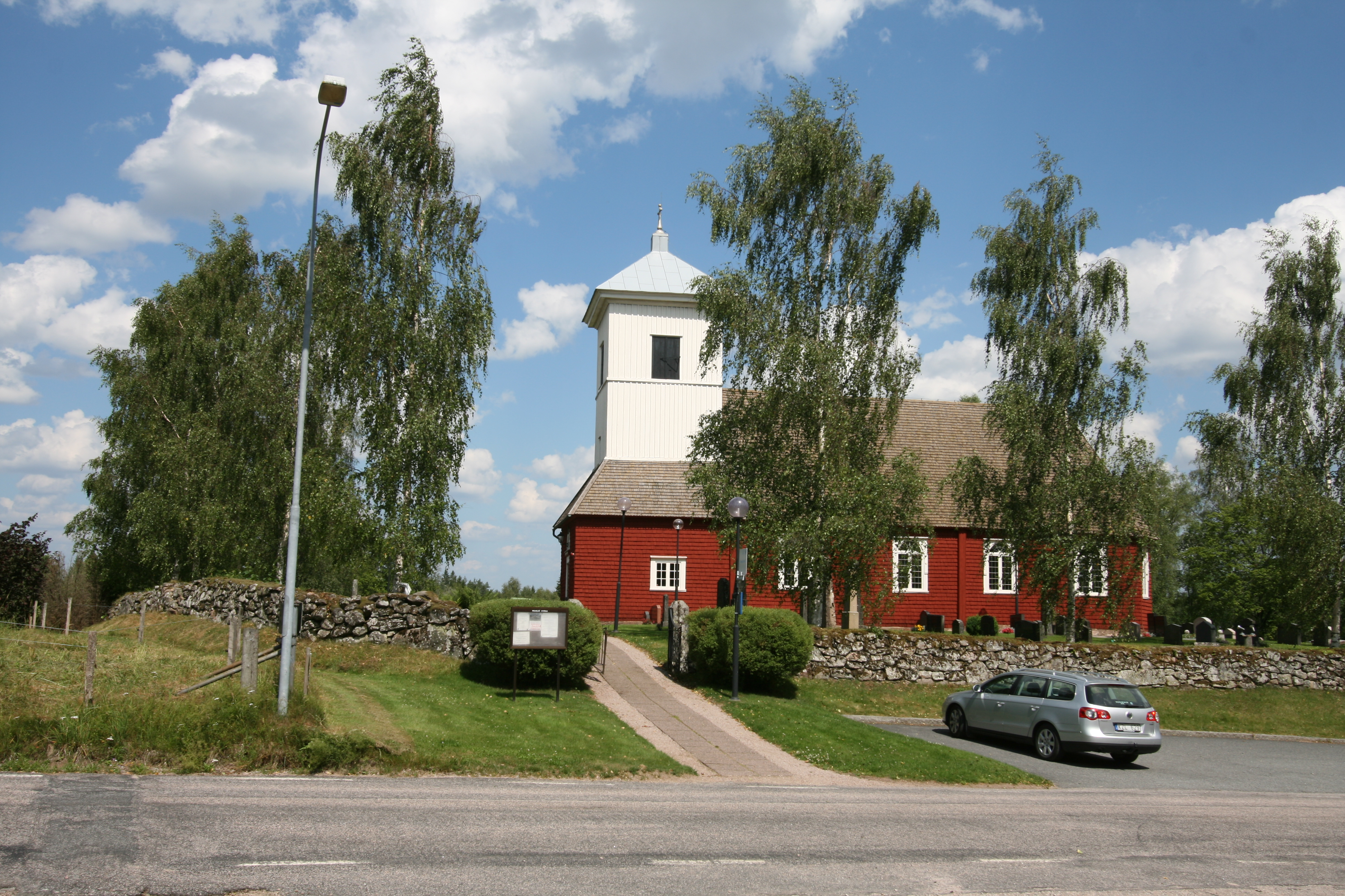 Roasjö kyrka